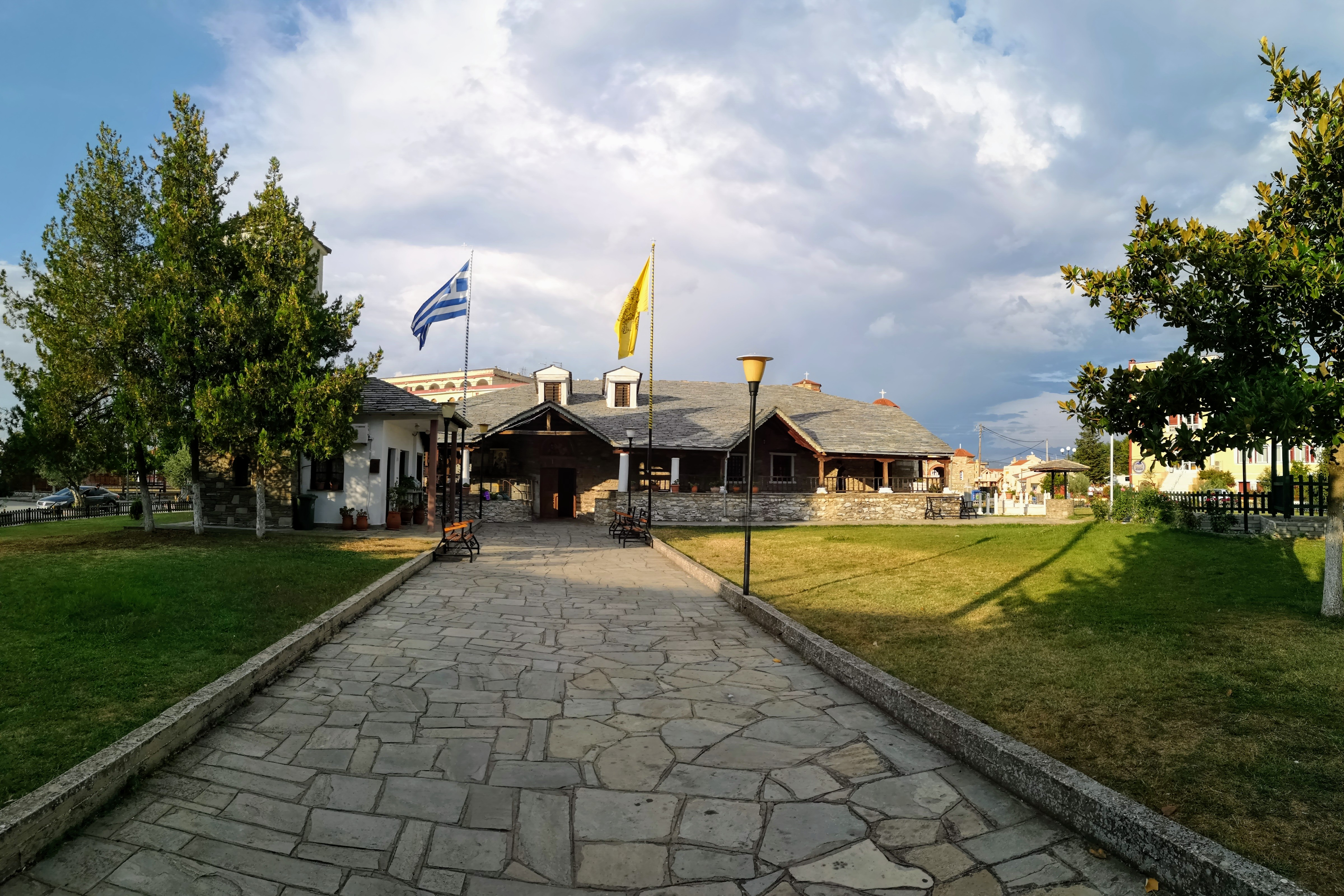 Ναός Αγίου Νικολάου Ελευθερουπόλεως«Ναός Αγίου Νικολάου Ελευθερουπόλεως»